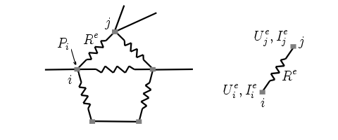 Schéma électrique (Exemple de problème discret)